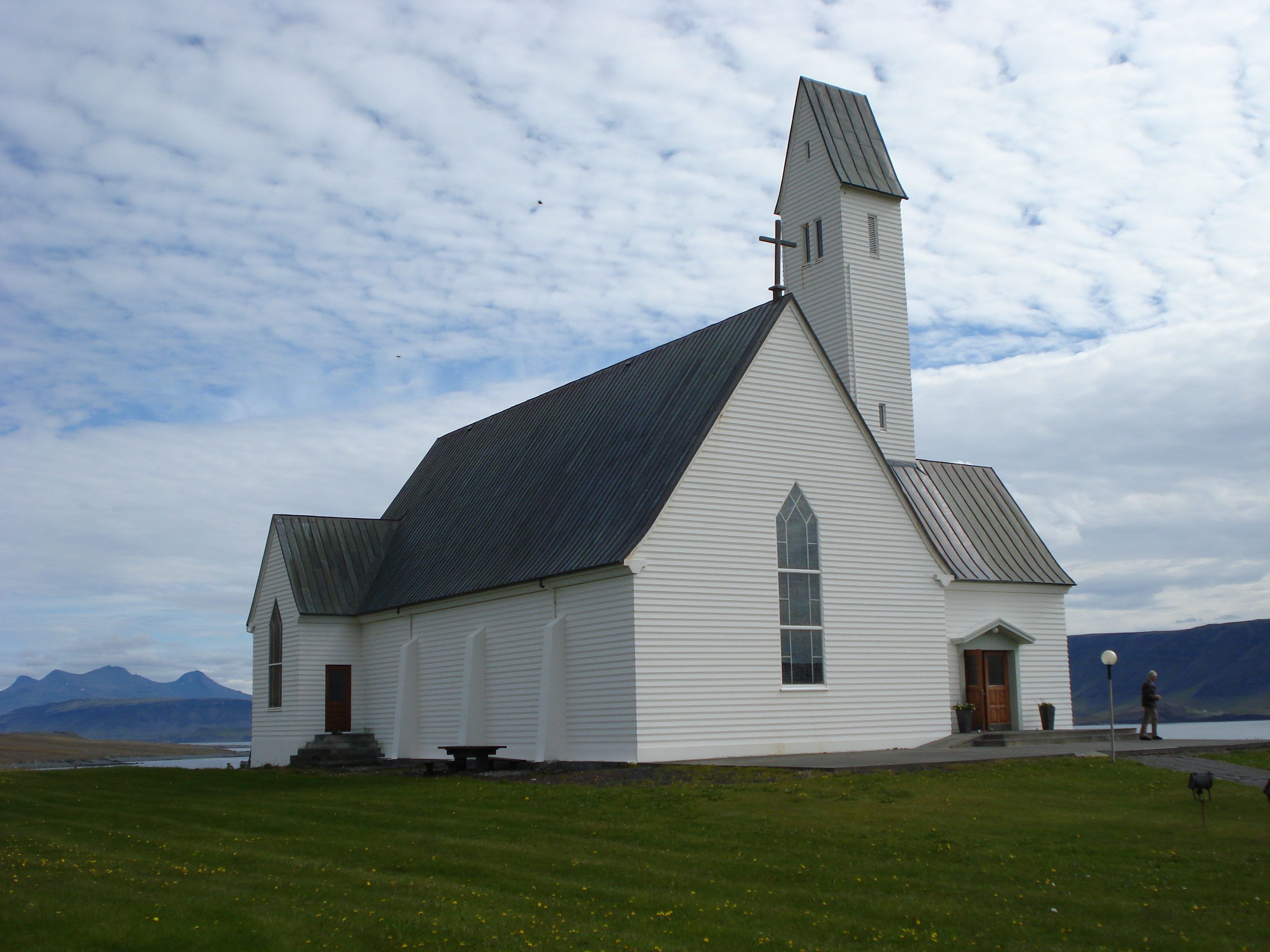 Hallgrímskirkja í Saurbæ (Hvalfjörður): Kirkjan er reist af íslensku þjoðinni til minningar um sr. Hallgrím Pétursson. Vigð varð hún 28.7.1957. Arkitektanir voru Sigurður Guðmundson og Eiríkur Einarsson.